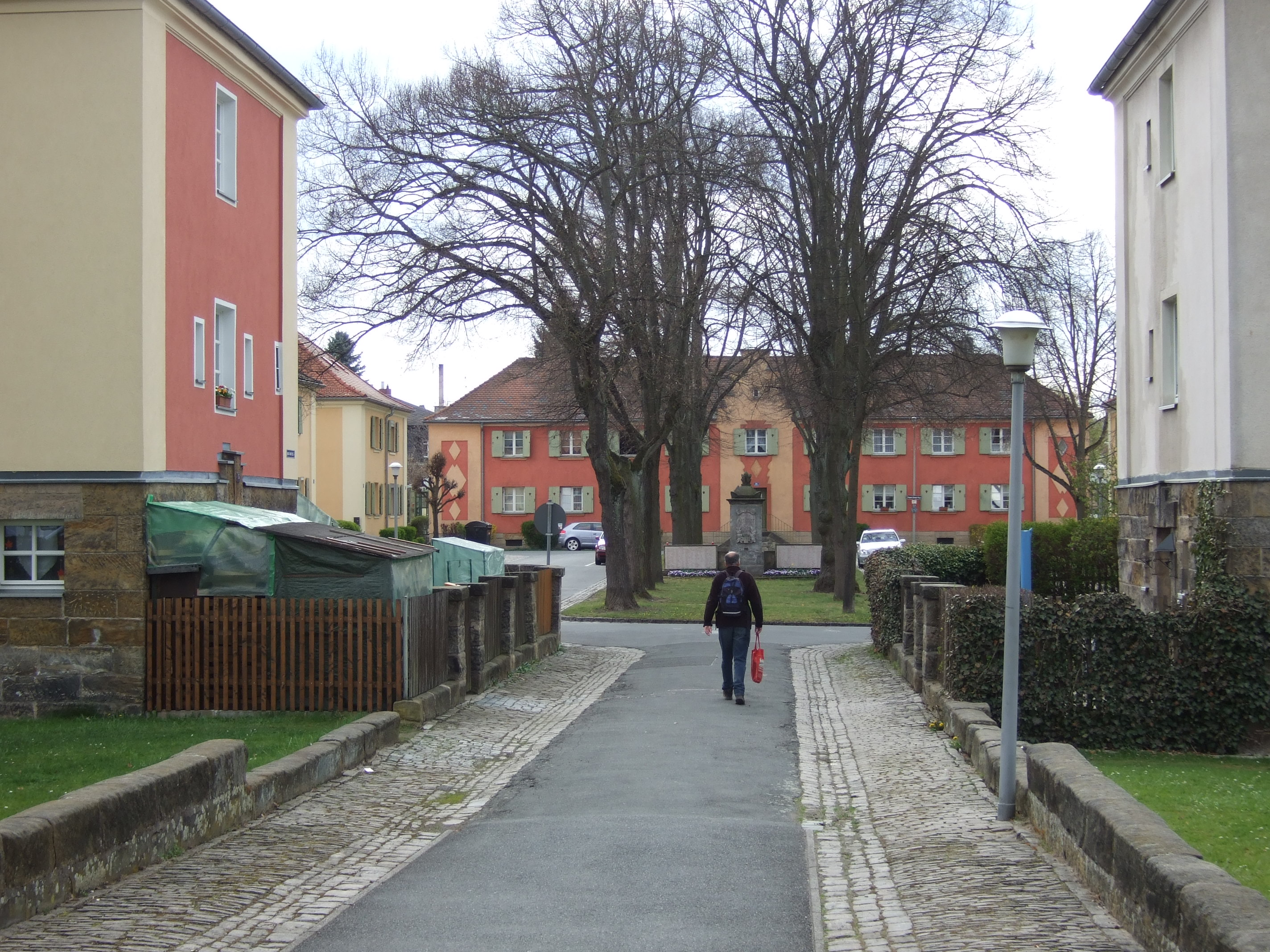 August-Bebel-Platz Bayreuth